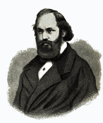 Der österreichische Politiker und Schriftsteller Moritz Hartmann.